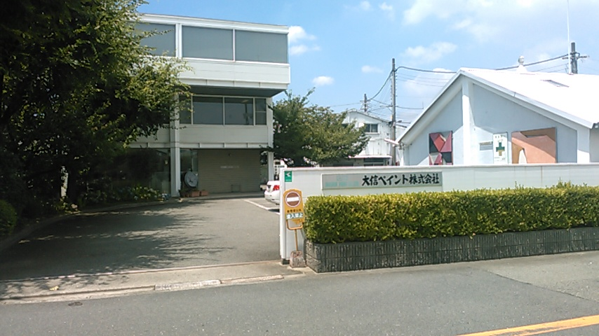 大信ペイント株式会社の本社写真です。 本社工場正門向かい側から正面を写した画像となります。